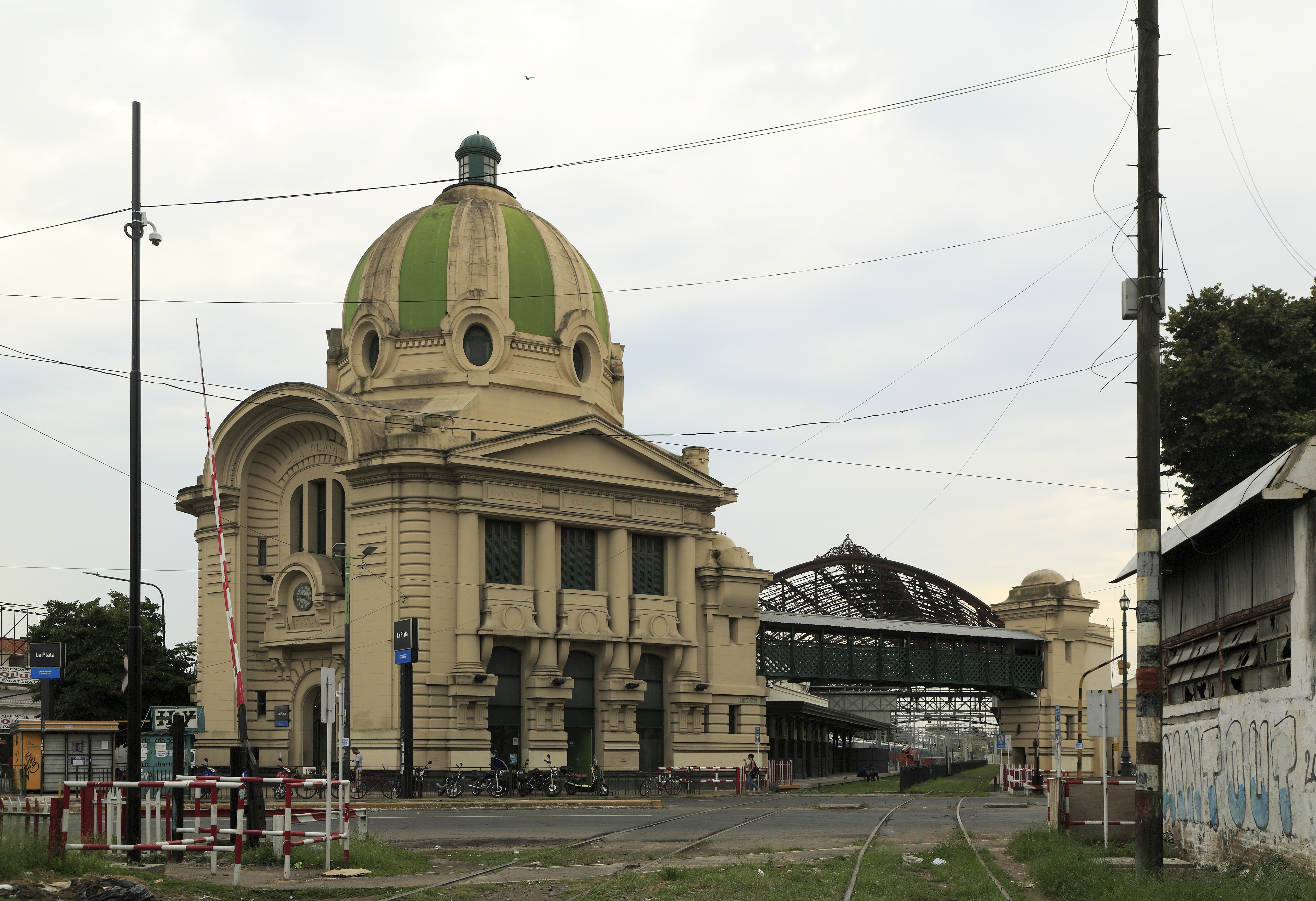 Empfangsgebäude und Gleise Richtung Hafen und Stadtgebiet, die Straße im Vordergrund ist die Calle Diagonal 80. Mit Straßennamen war man in La Plata nicht sehr einfallsreich.